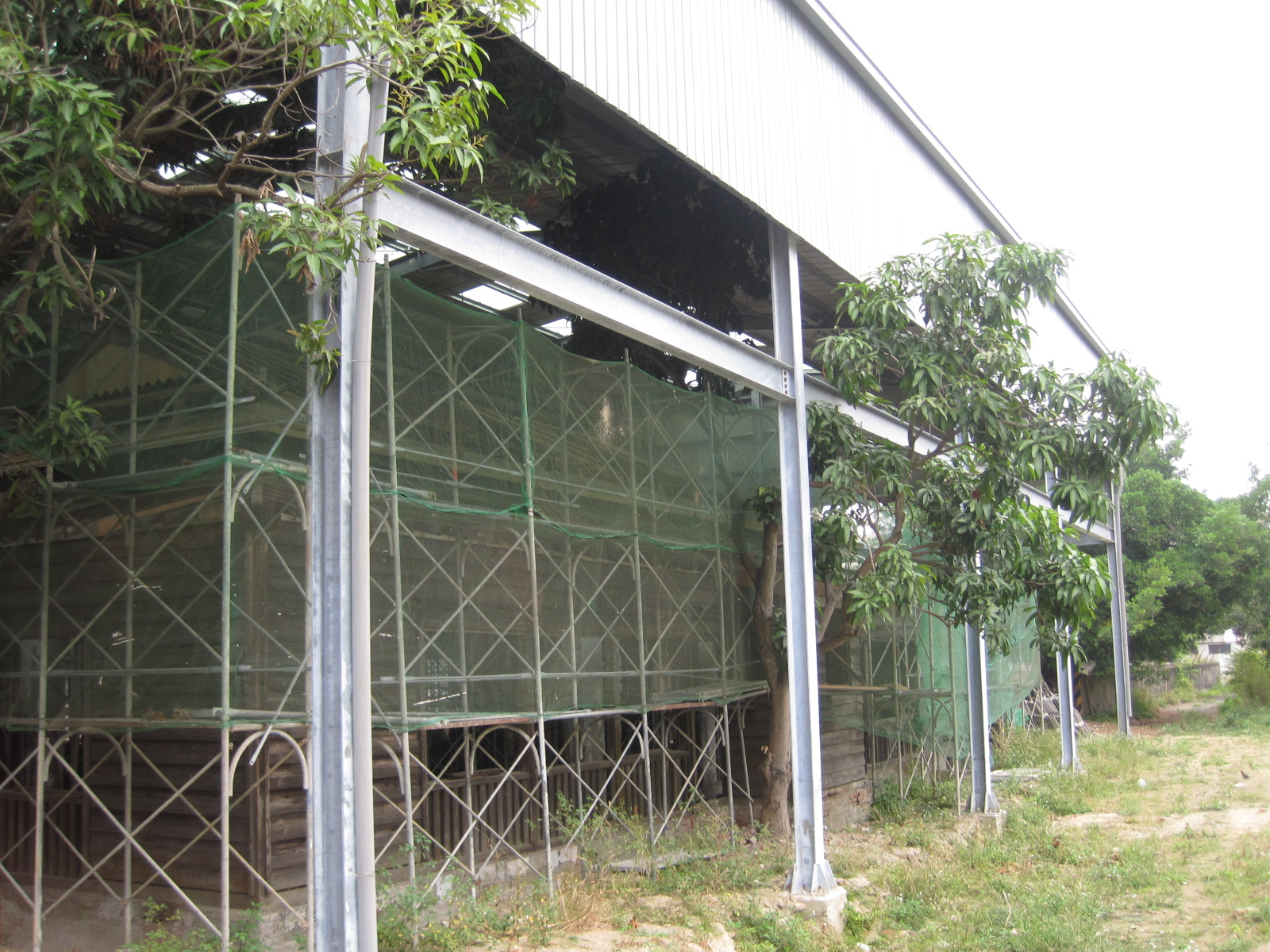 整修中的新化武德殿